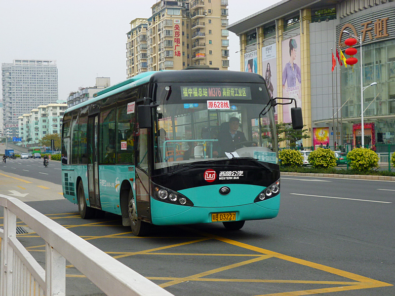 中文（中国大陆）: 深圳公交M376路宇通客车ZK6926HGA（西部第一批次）